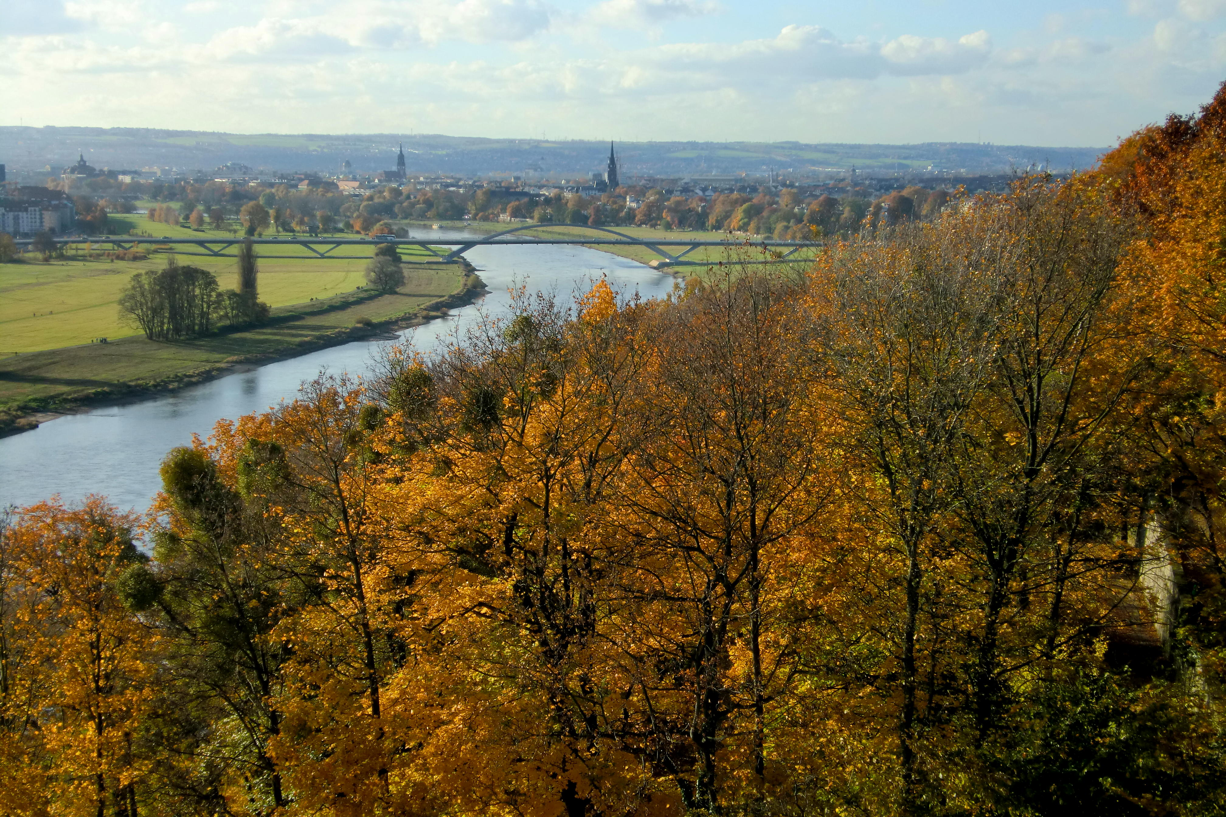 Dresden 2014, Lingnerschloss Stadtblick mit Waldschlößchenbrücke